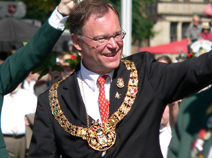 Stefan_Weil_